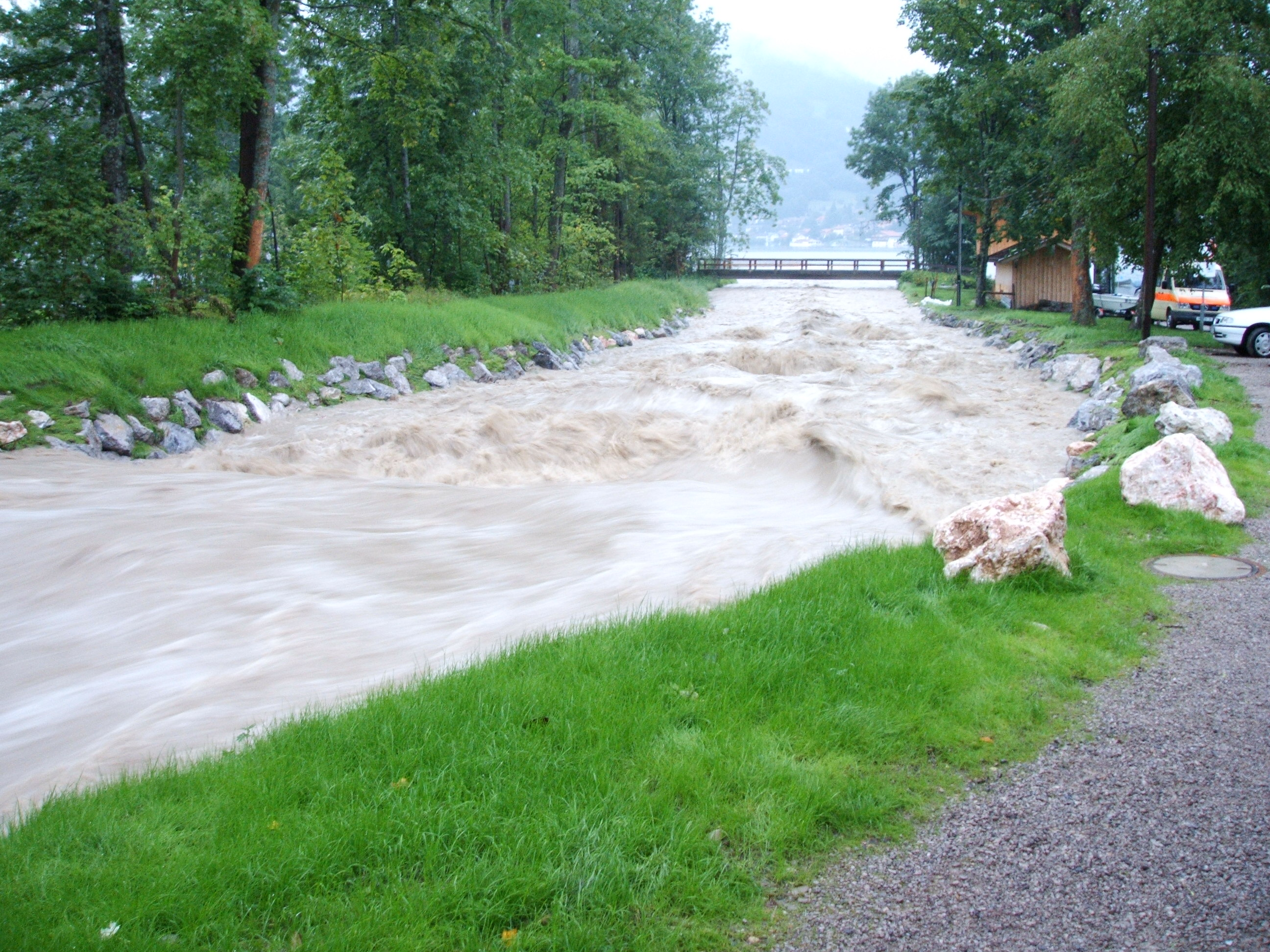 Der Söllbach in Bad Wiessee am 23.08.2005 während des Alpenhochwassers 2005, Abflussmenge etwa 29 m³/s. Blickrichtung Tegernsee